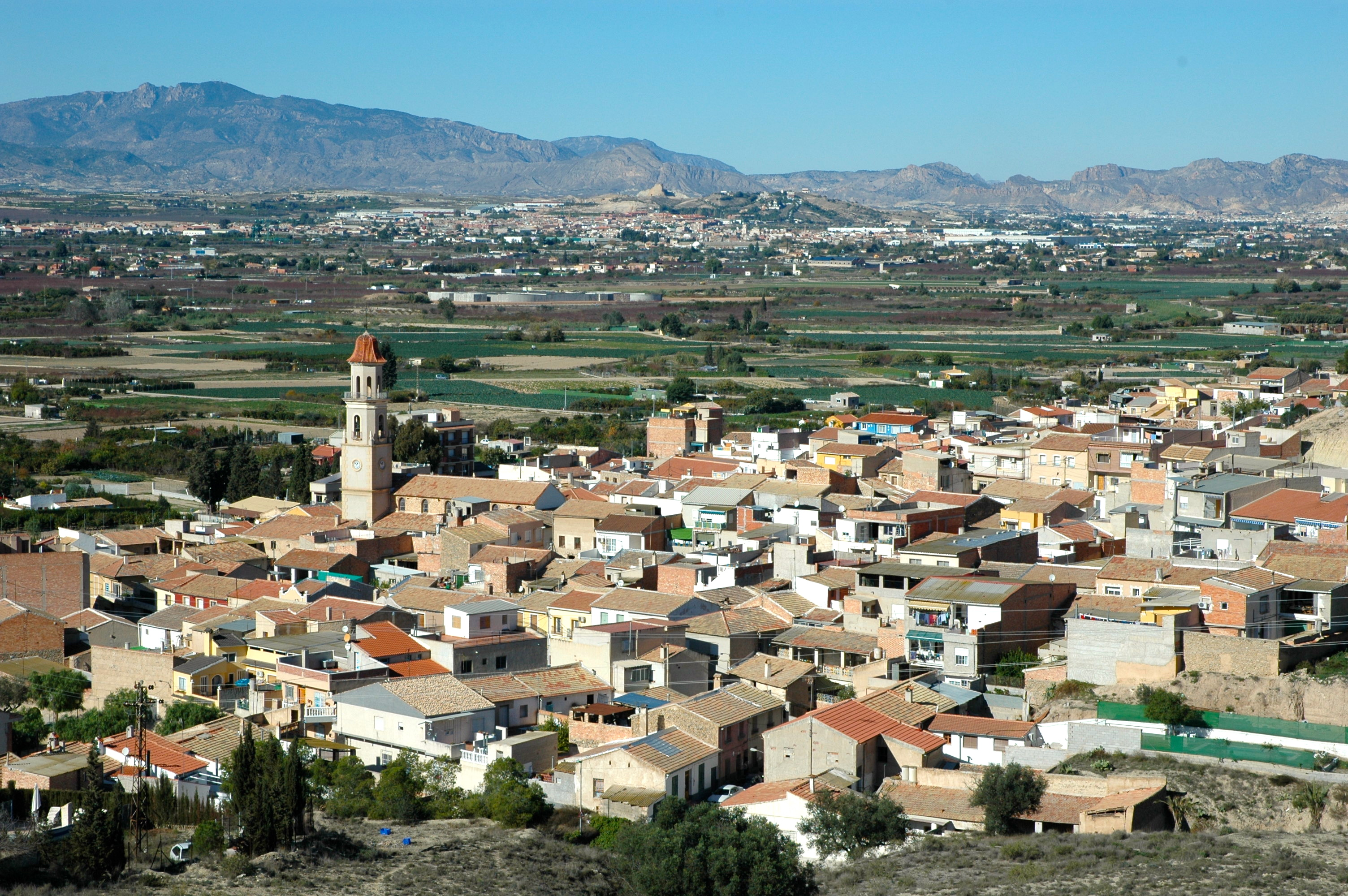 Foto panorámica de la pedanía desde lo alto.